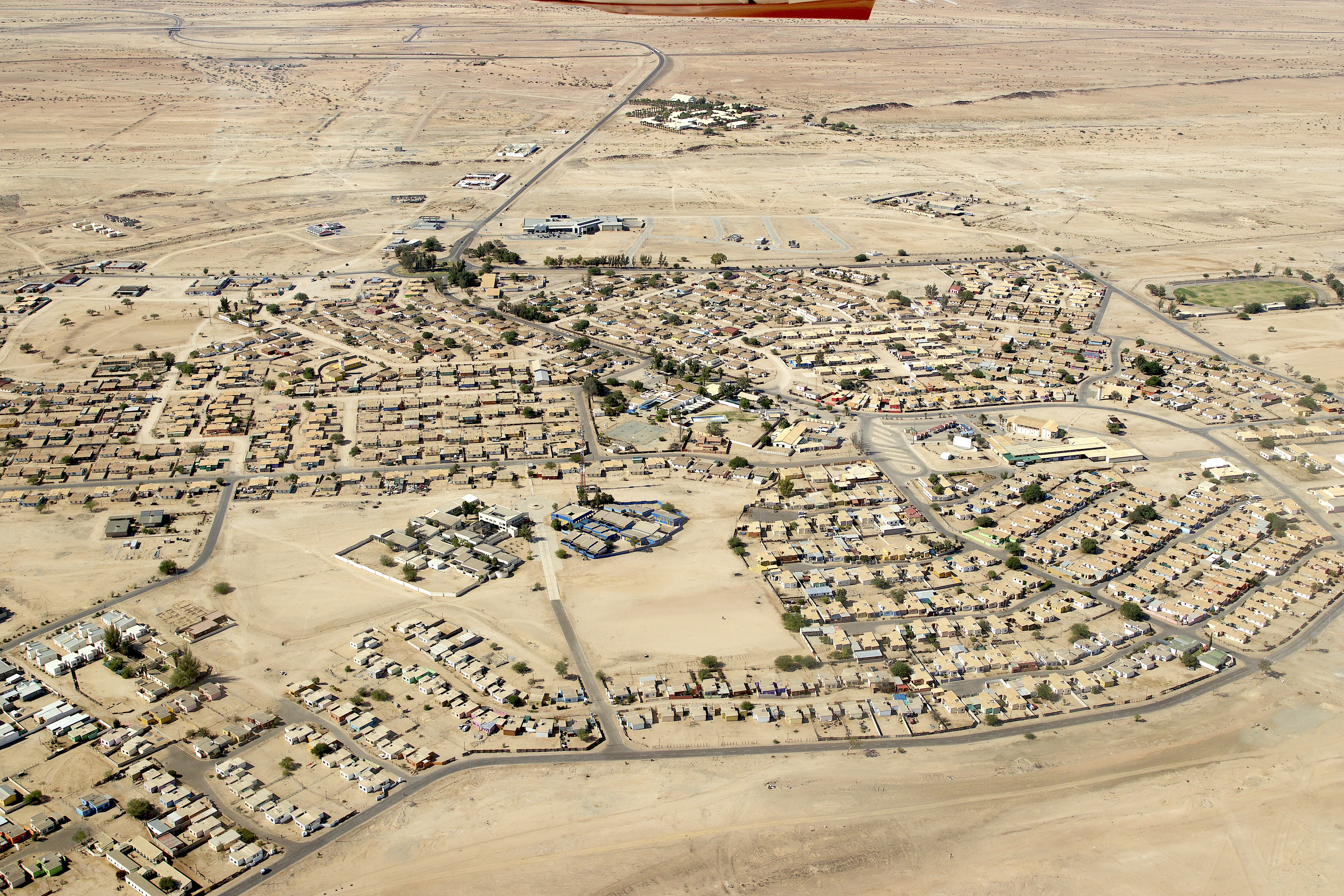 Arandis (2018)